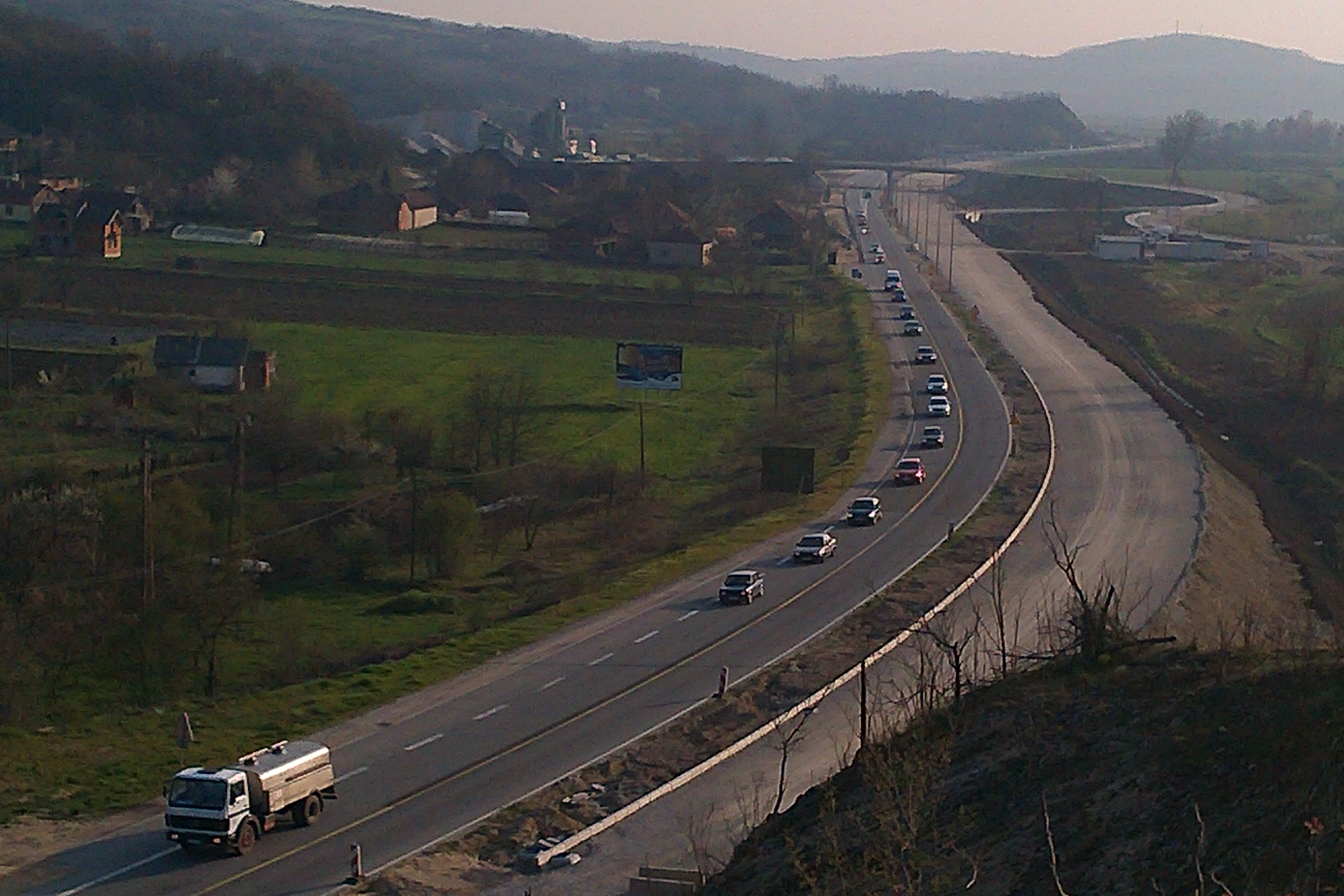 Srpski (latinica): Magistralni put (budući auto–put) Batočina — Kragujevac kod Gradca